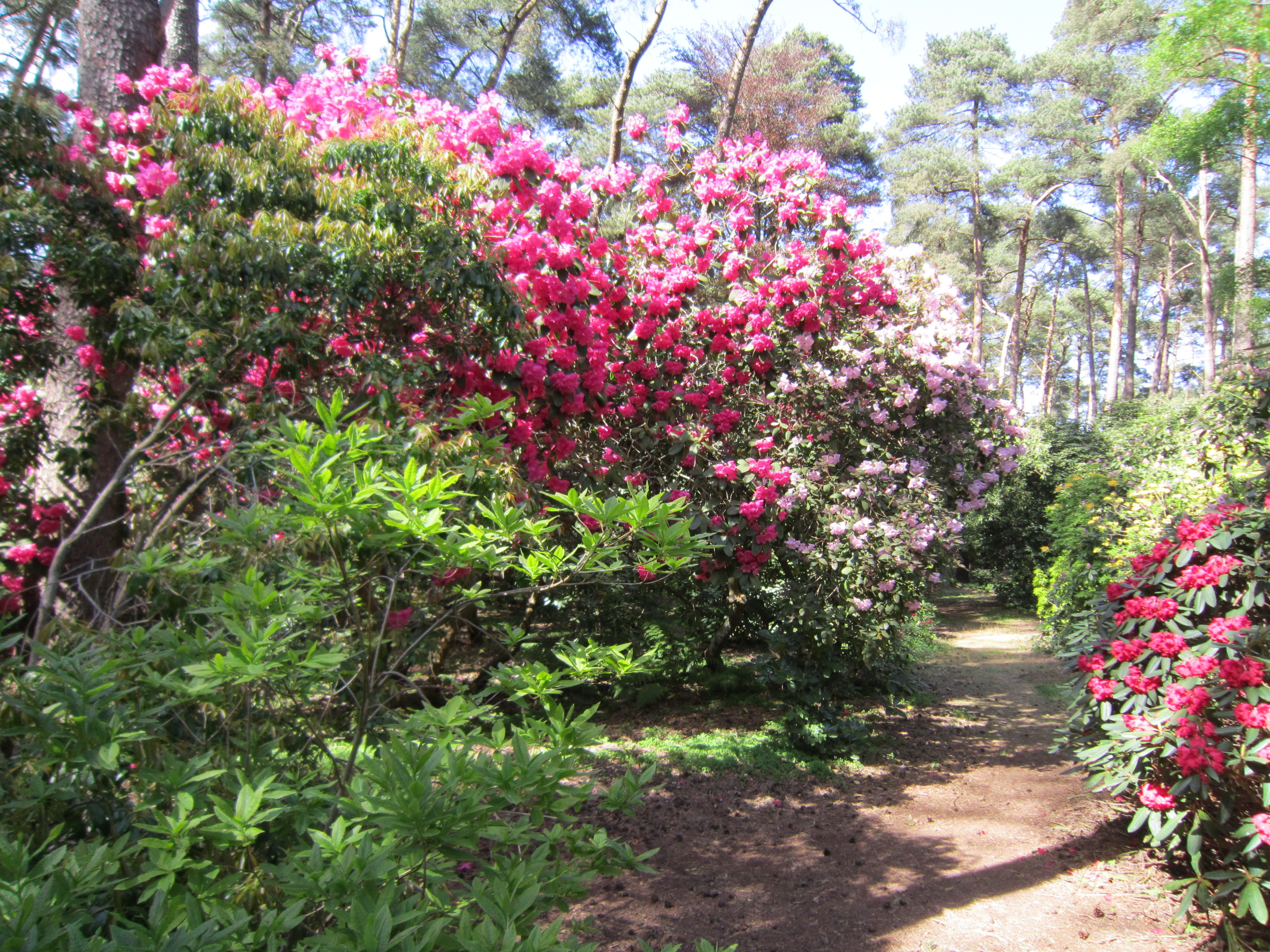 Pfad durch den Rhododendronpark Hobbie in Petersfeld (Stadt Westerstede im Ammerland)